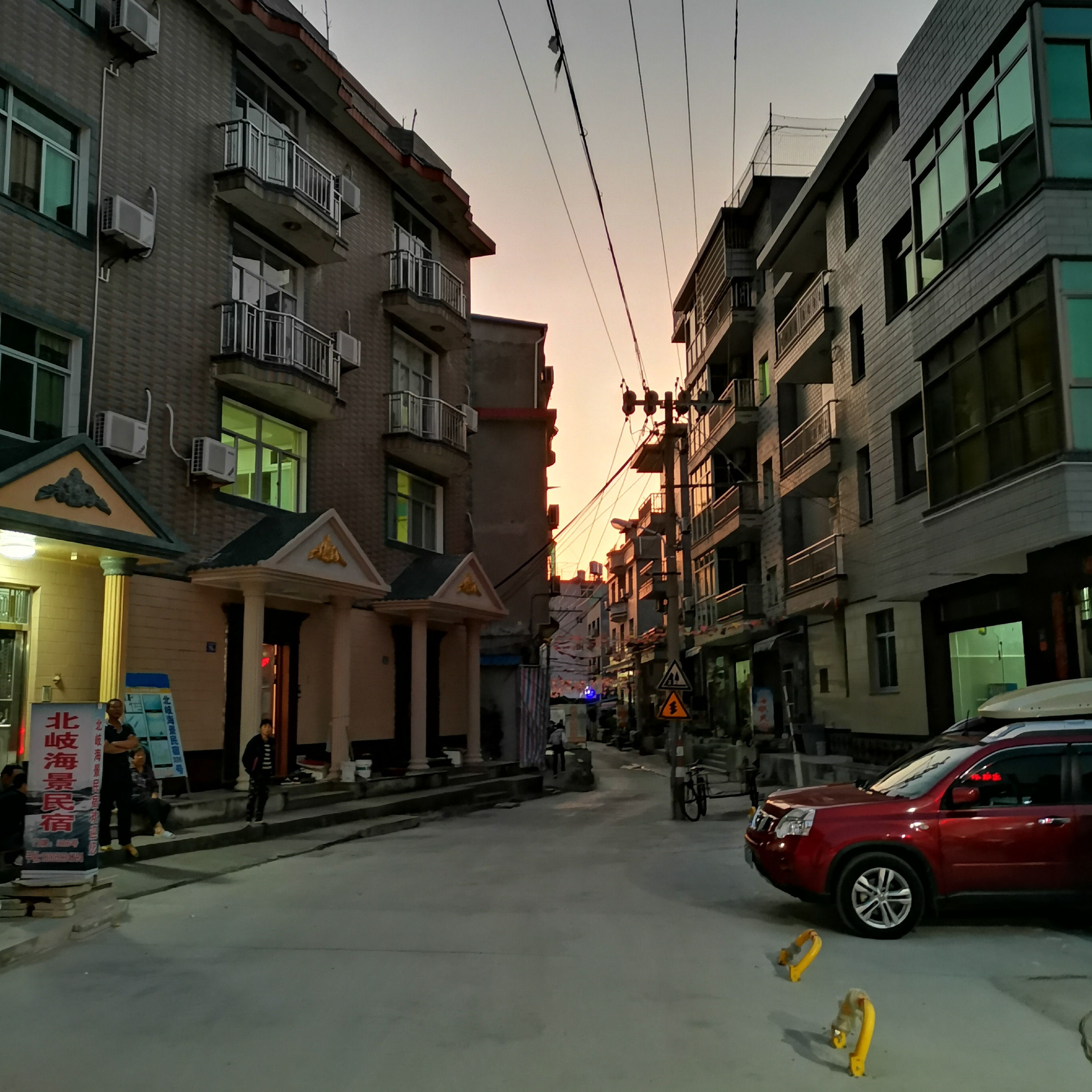 中文（中国大陆）: 松山街道北岐村